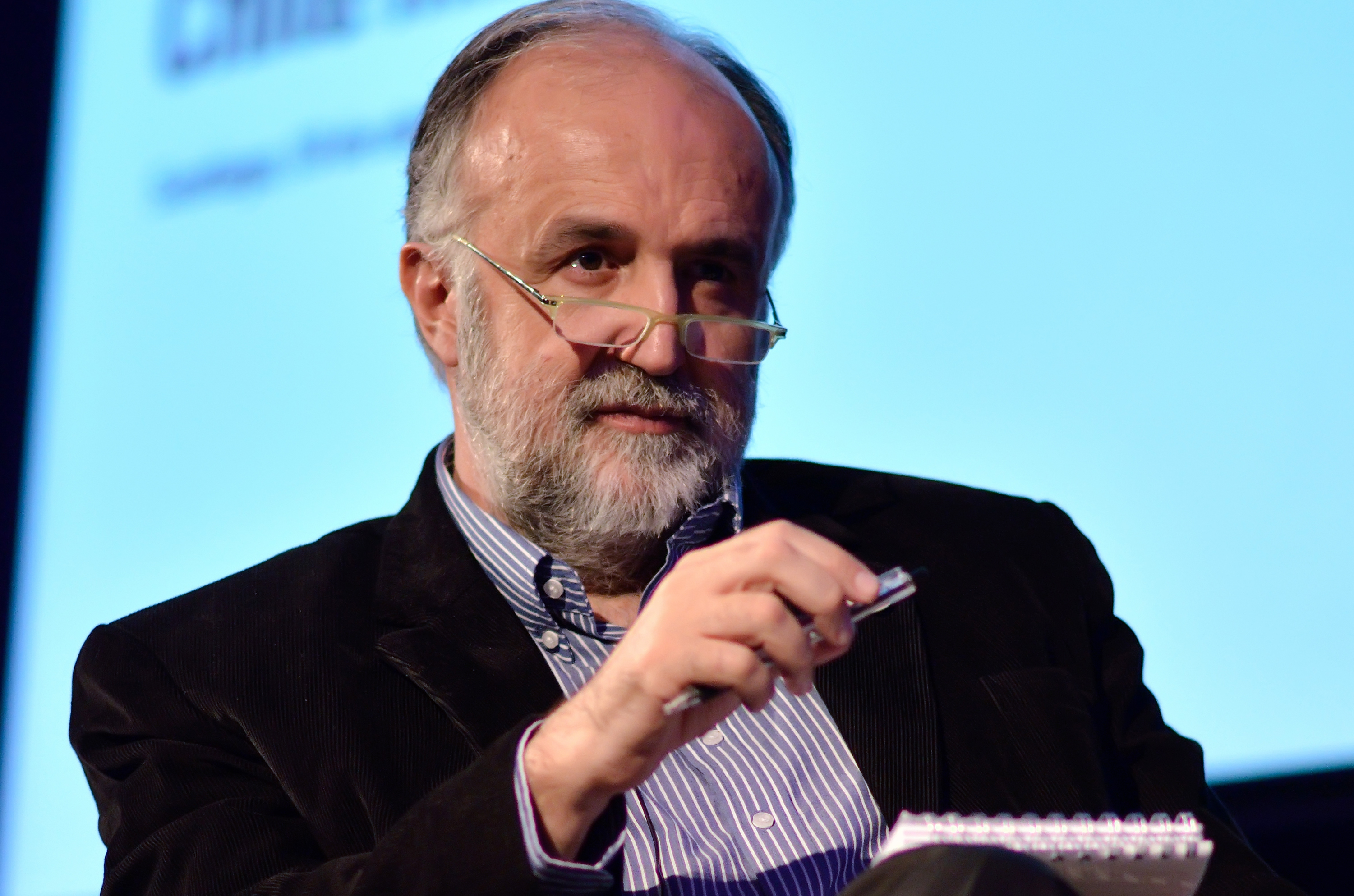 Marco Antonio de la Parra, Chilean writer.